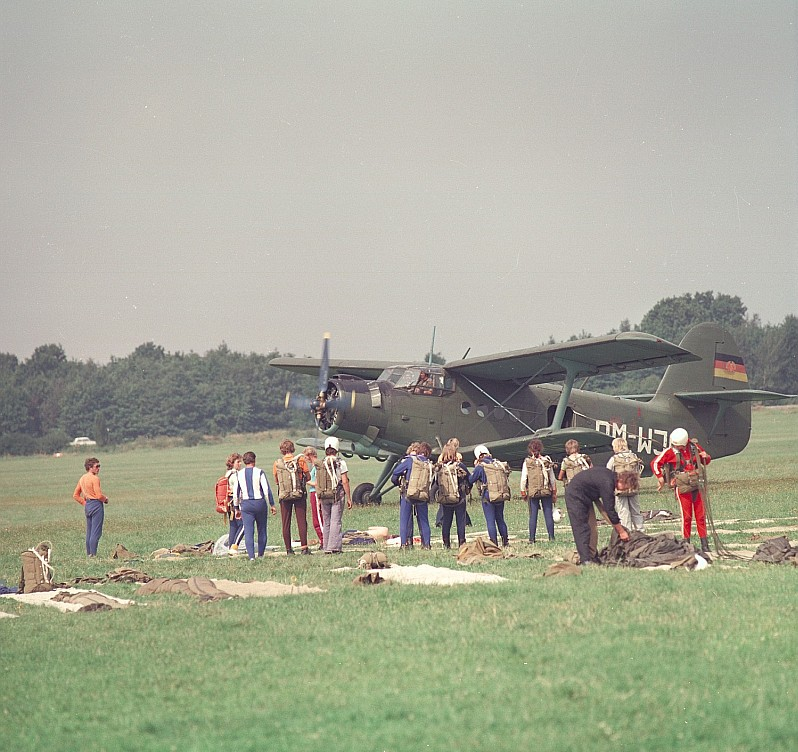 Original image description from the Deutsche Fotothek Fallschirmspringer, Gesellschaft für Sport und Technik (GST)